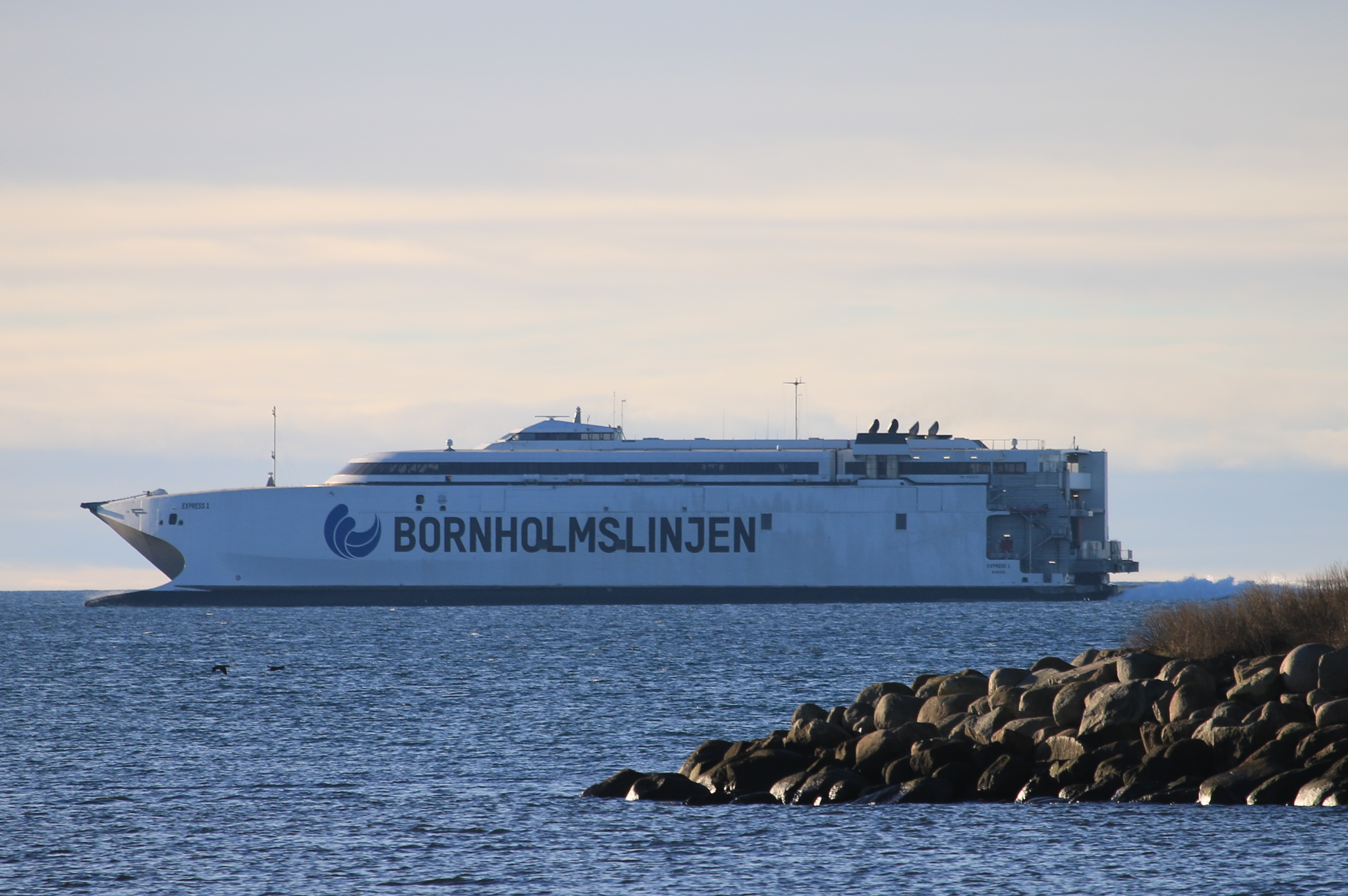 Express 1 på Bornholmslinjen